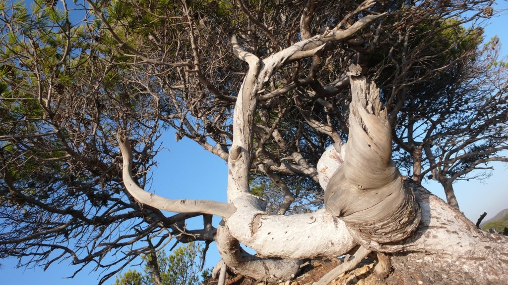 Pinus halepensis au Cap Léoube, Var - France